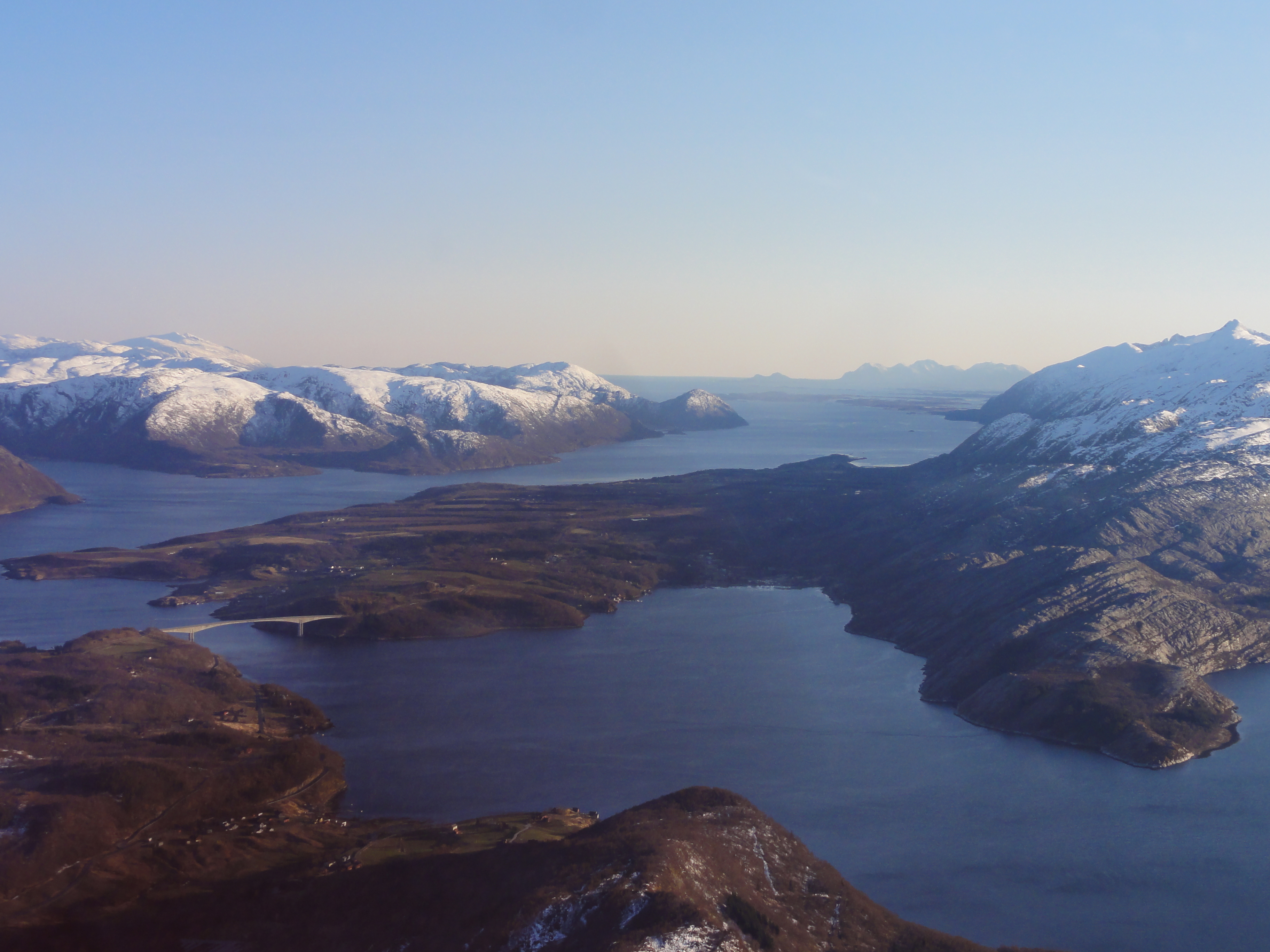 Vefsnfjorden på Helgeland i Nordland fylke. Leirfjorden i forgrunnen. Sundøy som er del av Alsten i forgrunnen, med Sundøybrua helt til venstre.